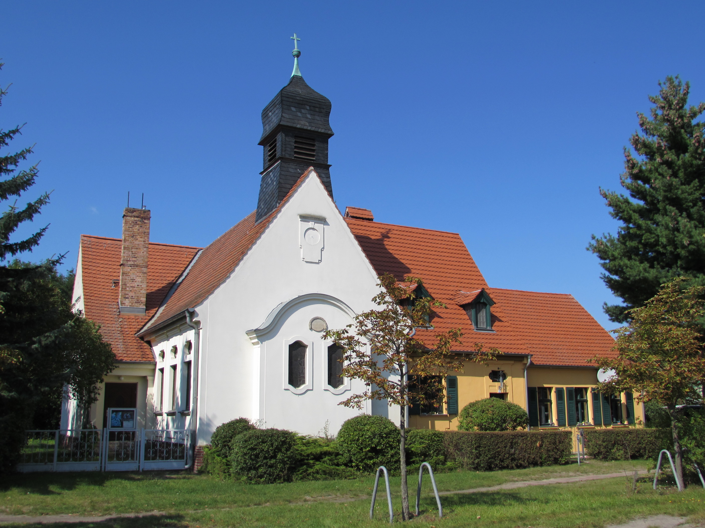 kirche wilhelmsdorf (brandenburg an der havel)